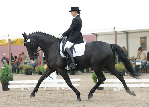 Audronė Krikštaponytė